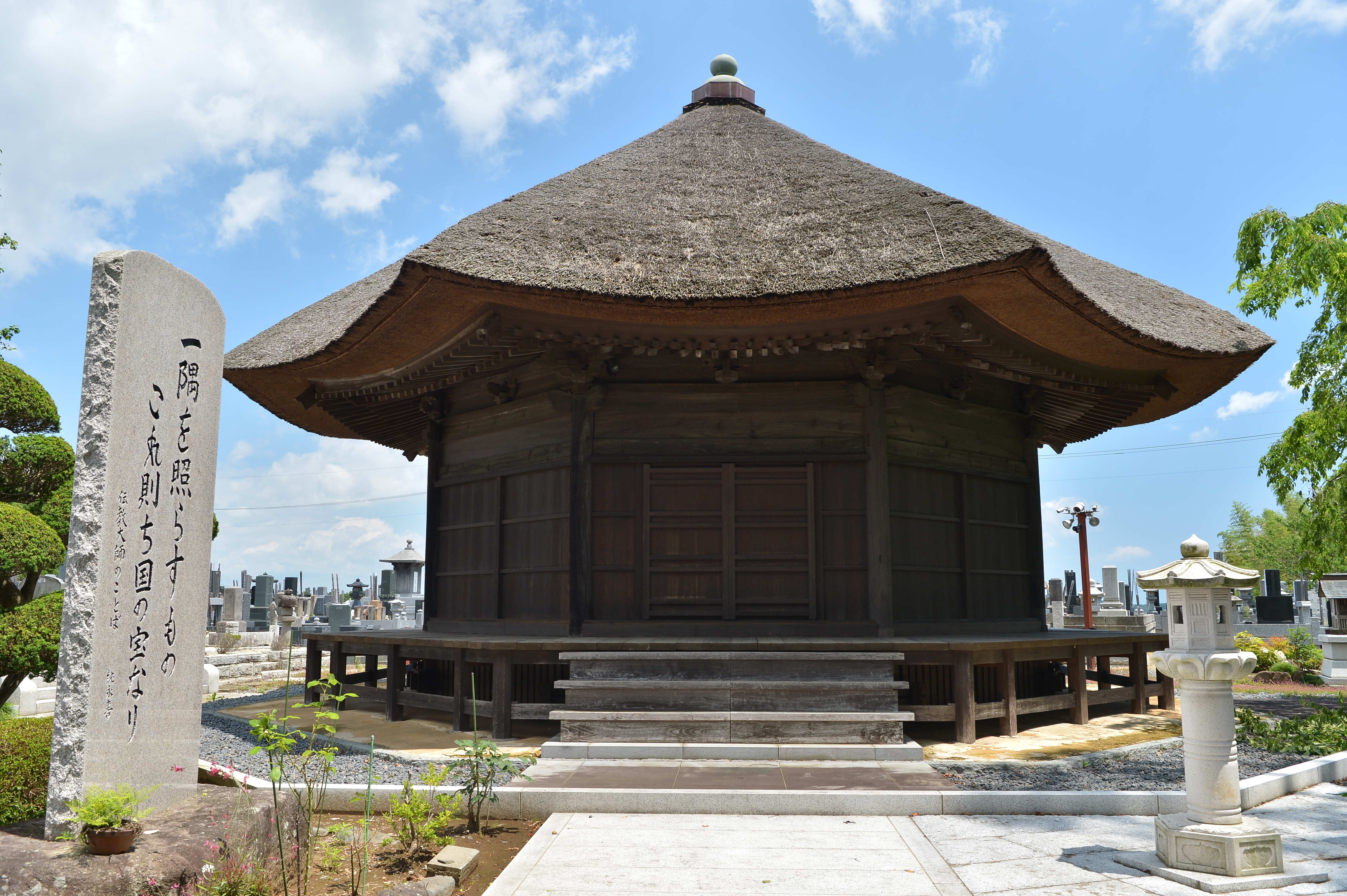 茨城県水戸市栗崎に所在する、仏生寺本堂。国指定重要文化財。安土桃山時代に建てられた、全国唯一の八角円堂である。